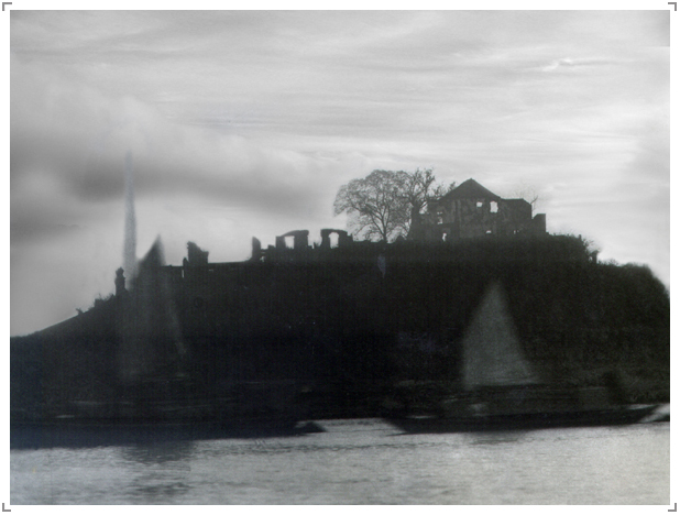 受损十分严重